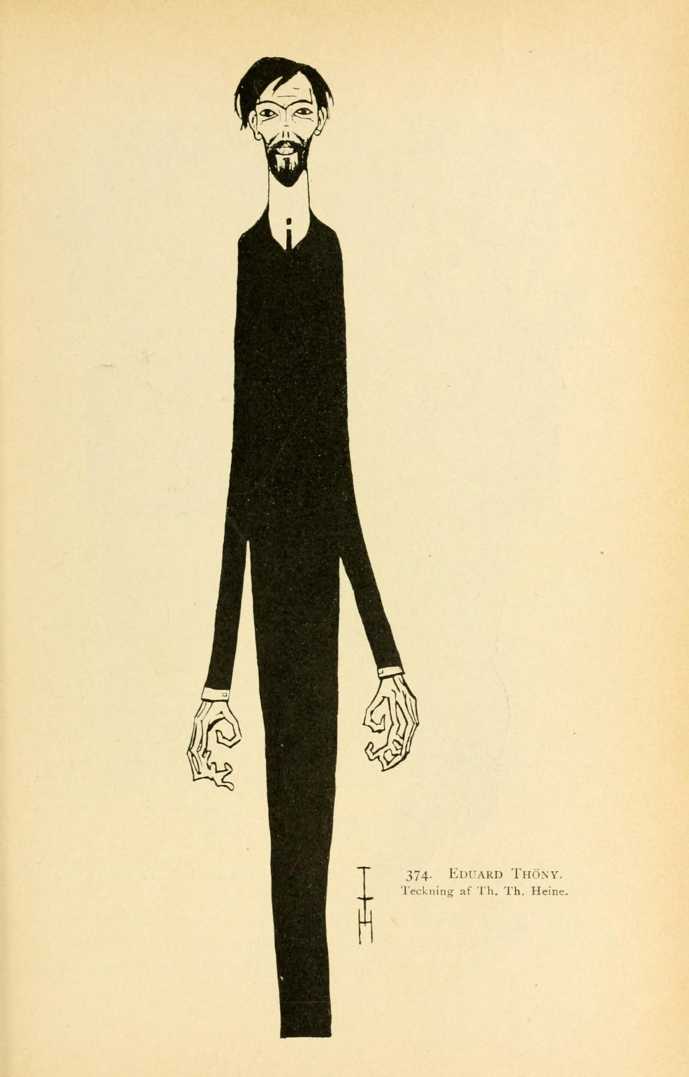 Eduard Thöny, gezeichnet von Thomas Theodor Heine